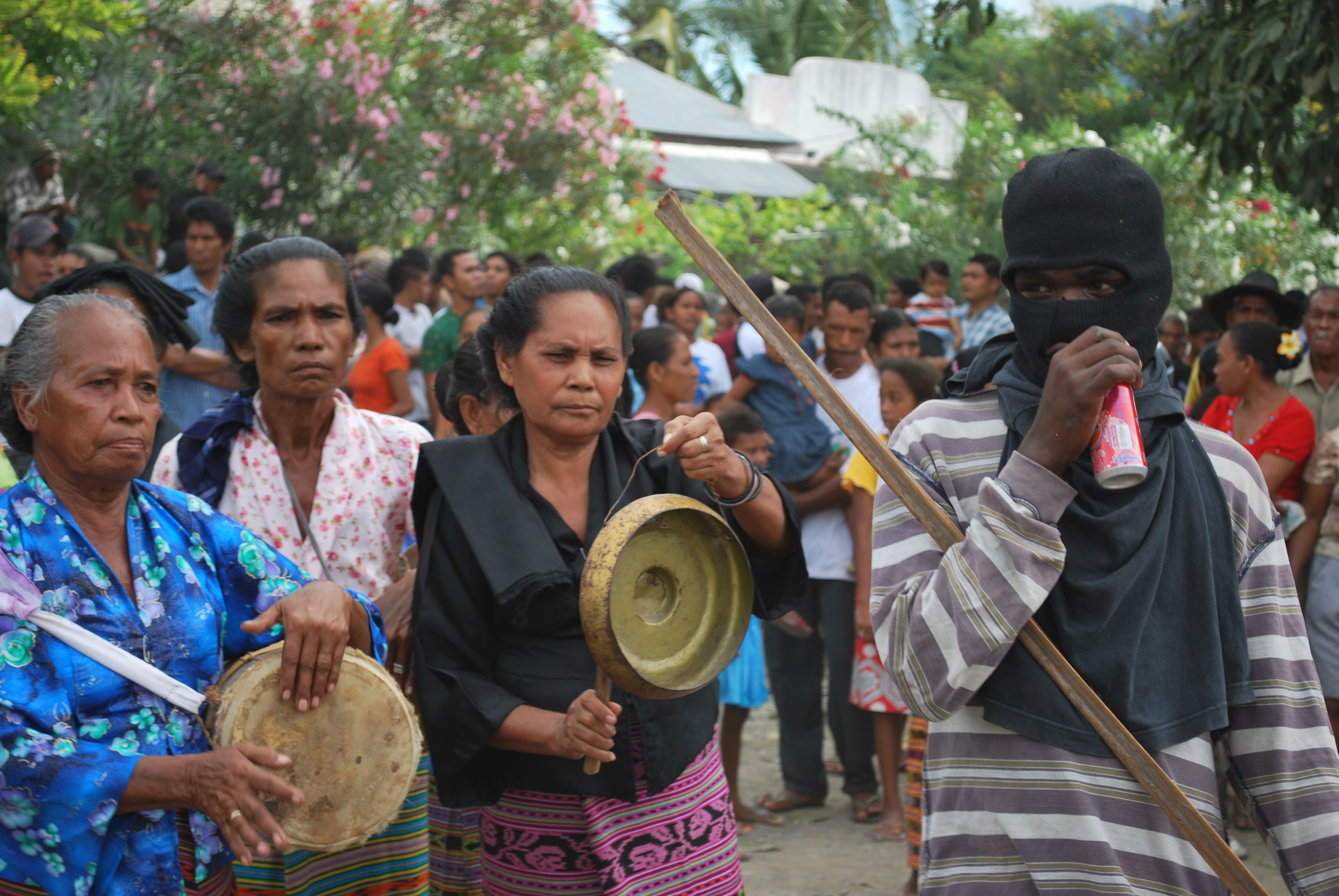 St. Antonius-Fest in Manatuto